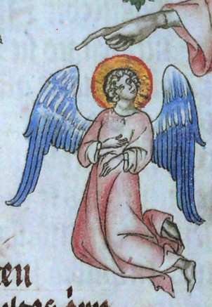 Anděl